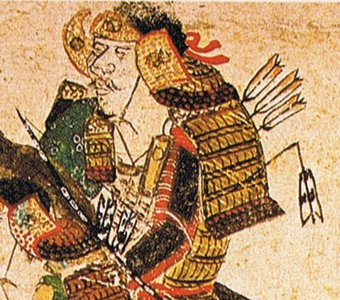 源義朝画像『平治物語絵巻』より